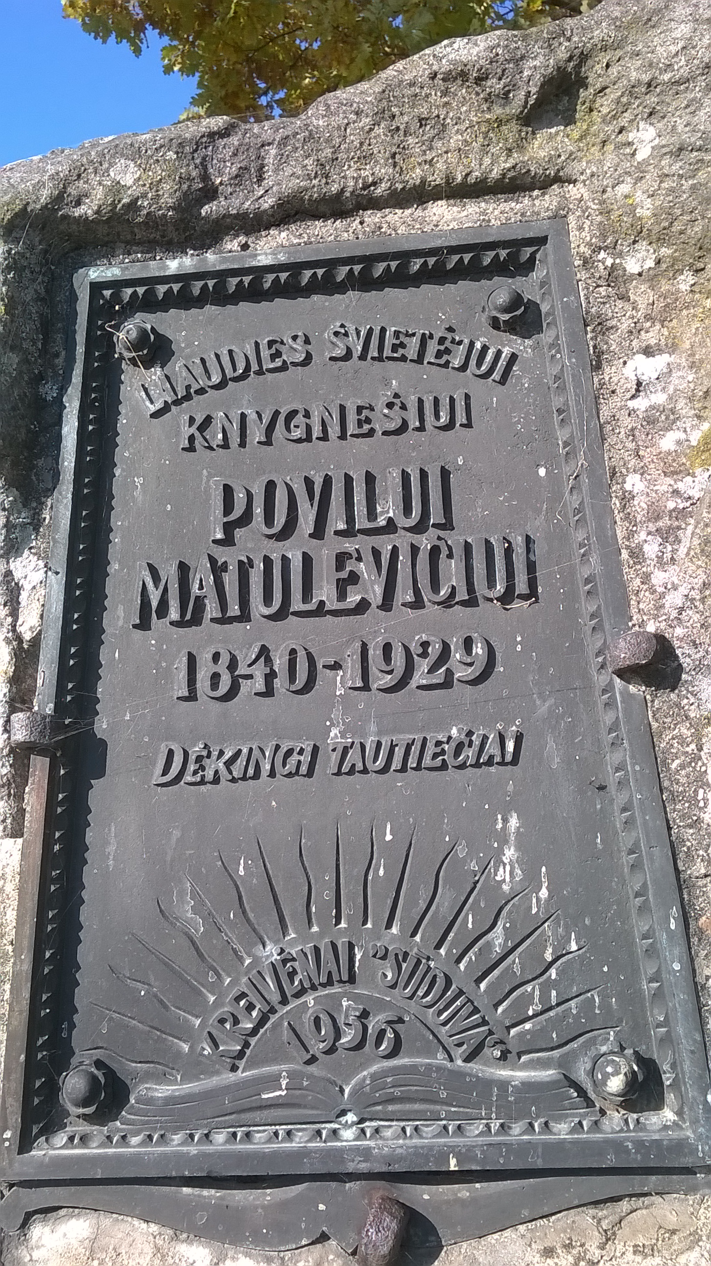 Krejwiany. Pomnik poświęcony "przemytnikom" książek. Tablica pamiątkowa.